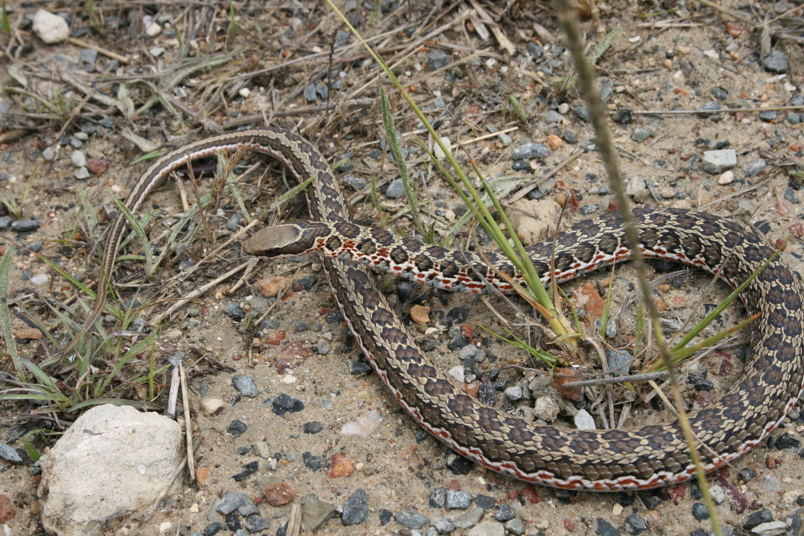 Psammophylax rhombeatus - Spotted Skaapsteker